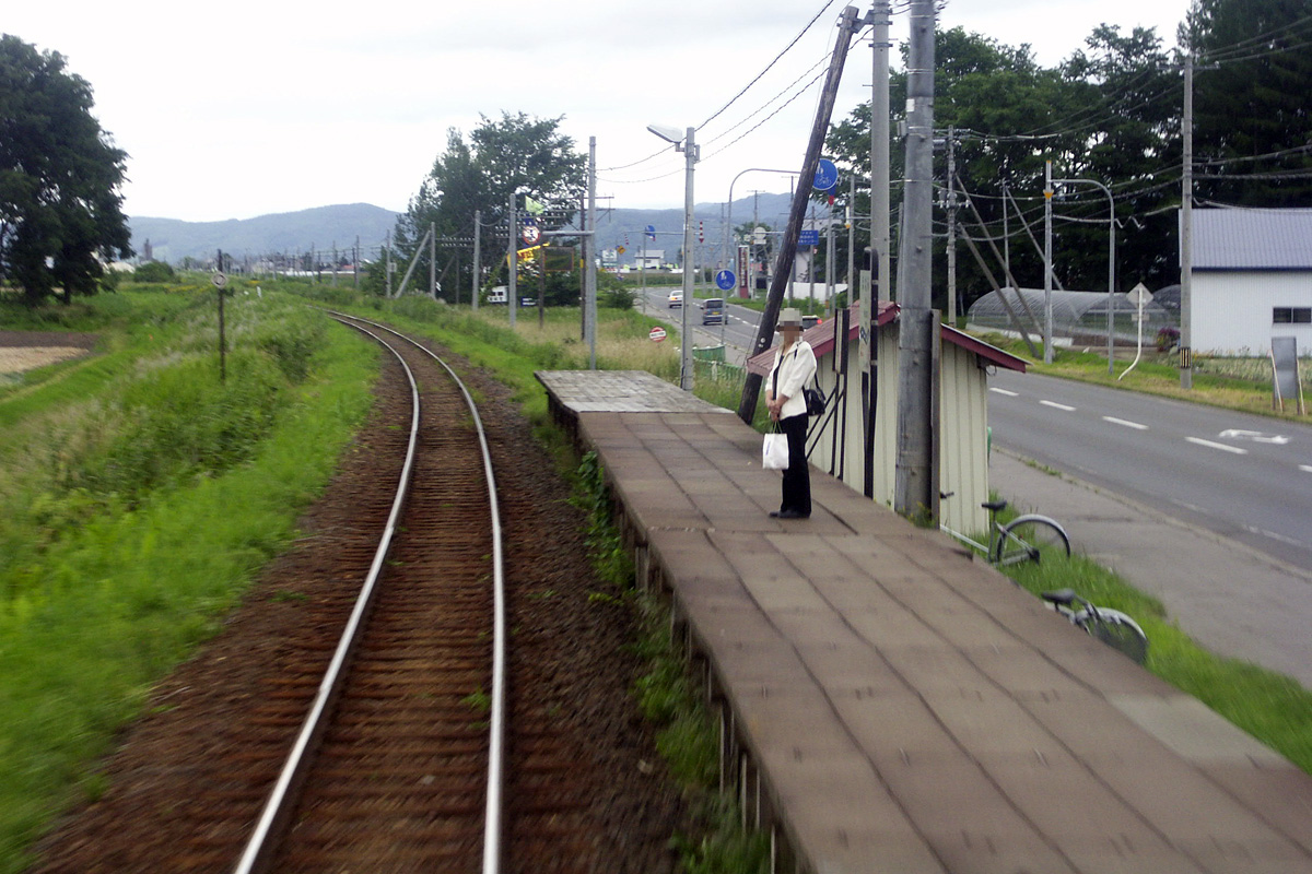 北海道ちほく高原鉄道・穂波駅